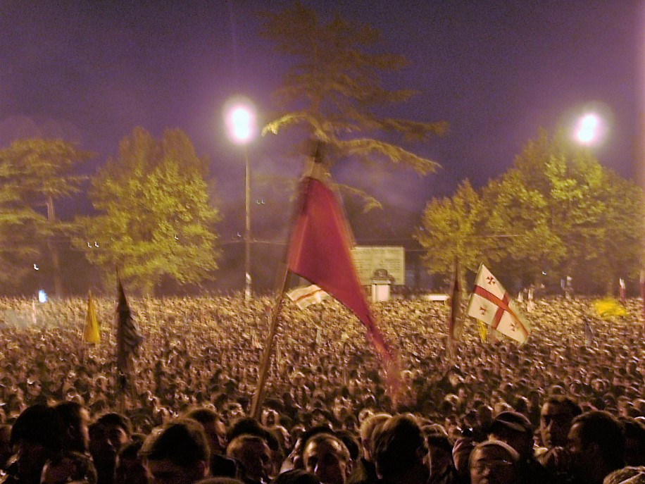 Tbilisi, Rose Revolution 2003.